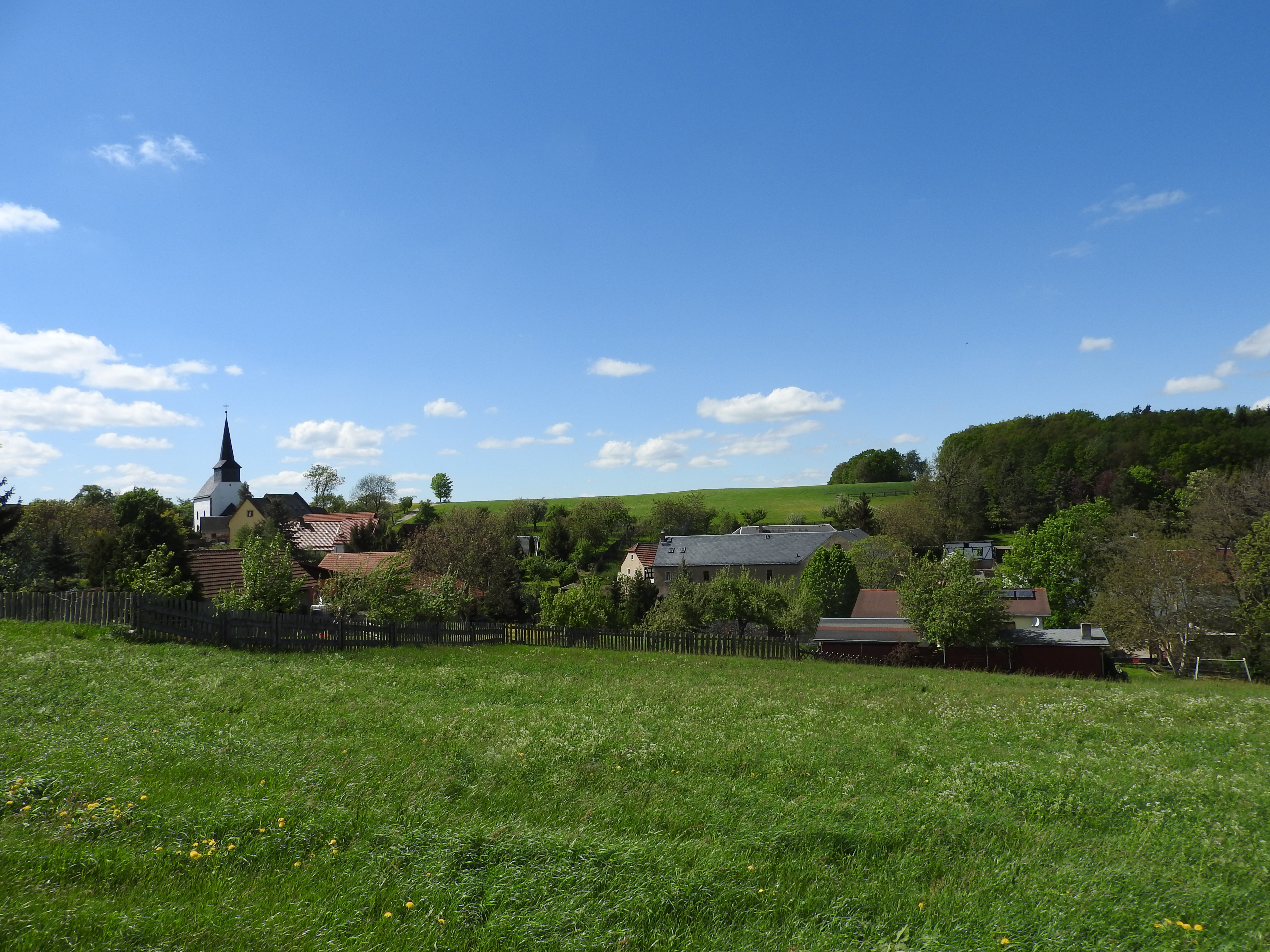 Schömberg, Weida, Thüringen